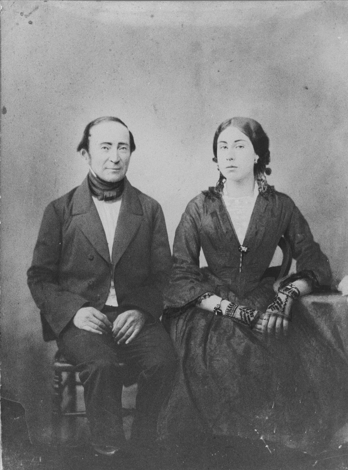 Ignacio Domeyko junto a su joven esposa hacia 1854